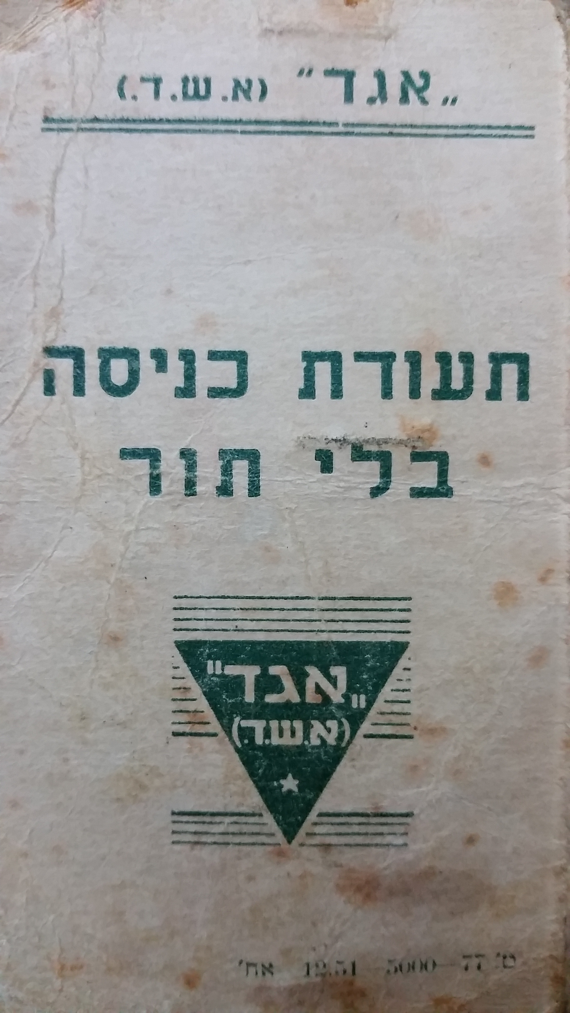 תעודת כניסה ללא תור לאוטובוס של אגד משנת 1952 - בו מופיע השם אשד